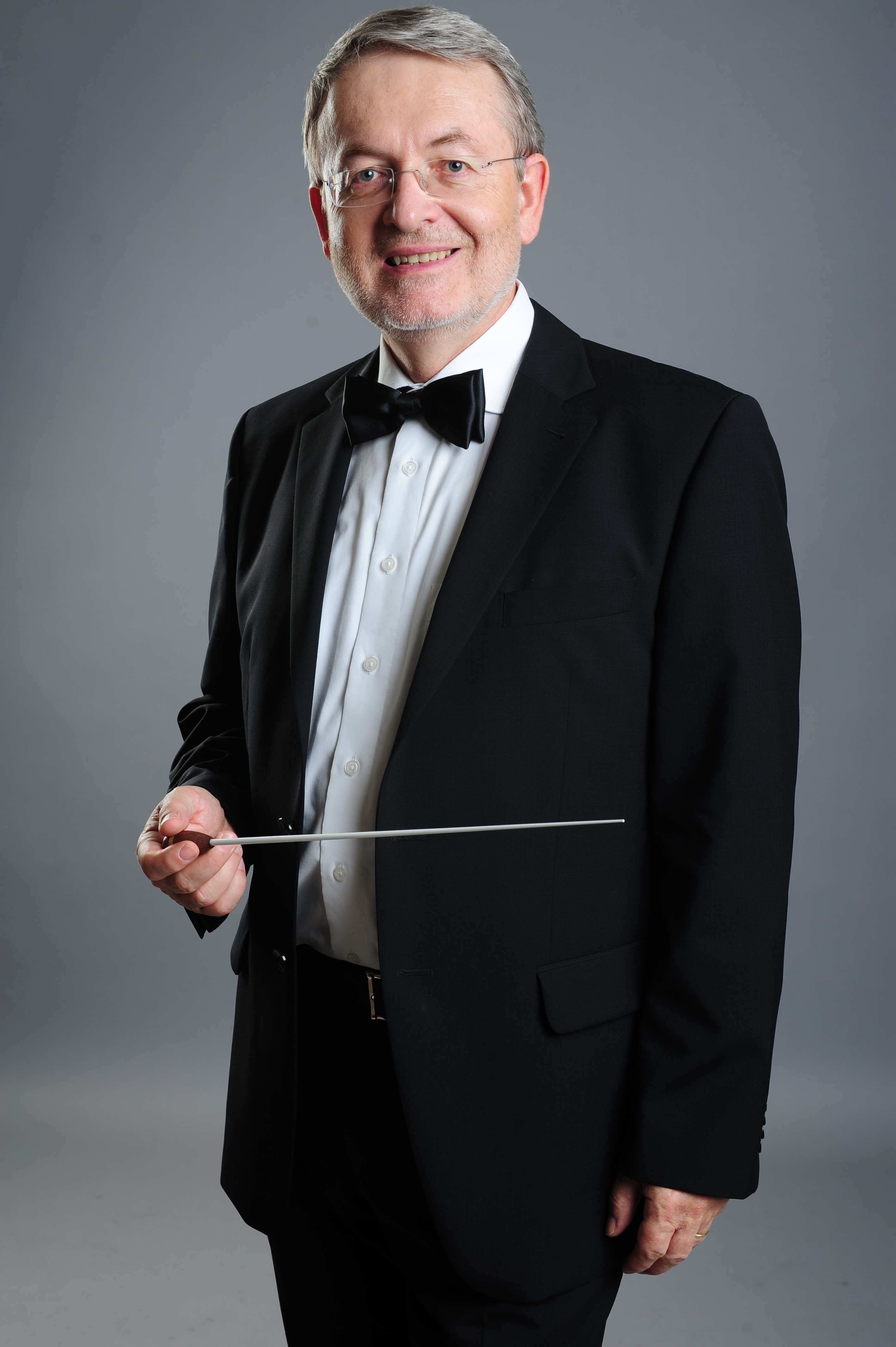 Peter Meincke (2012)